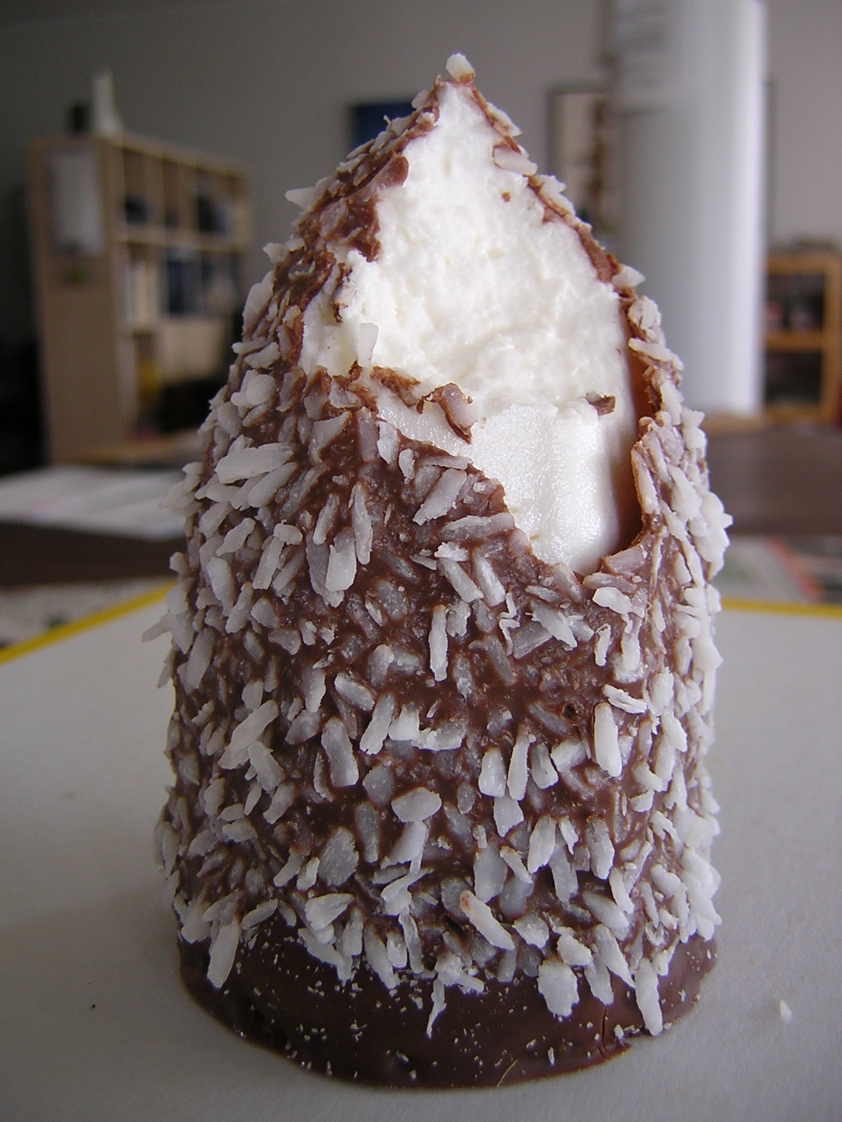 En gräddbulle även kallad kokostopp. Av märket Smaskens